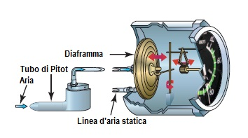 spaccato di un indicatore di velocità.